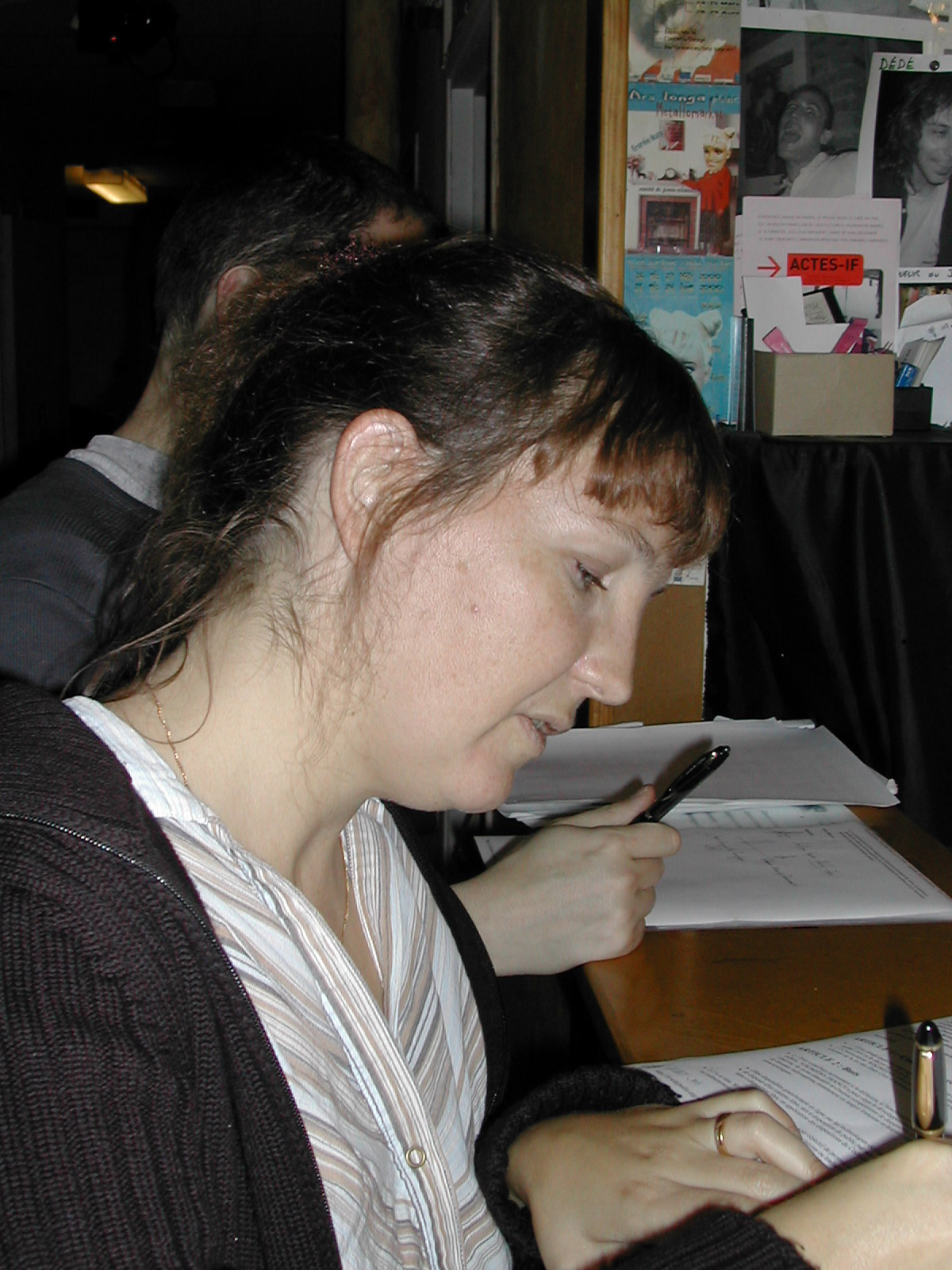 rencontre paris octobre 2004